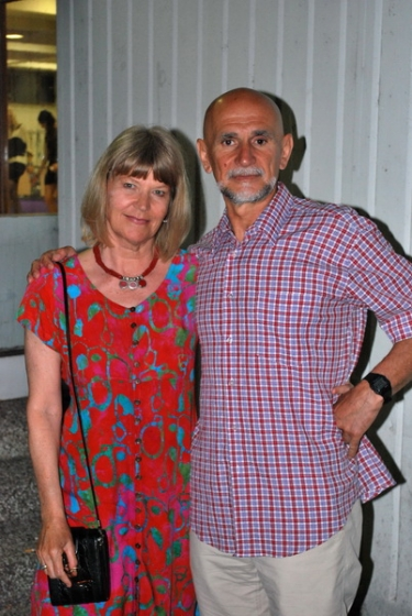 Zvonko Bušić na Grudskoj večeri u Zagrebu, 2009